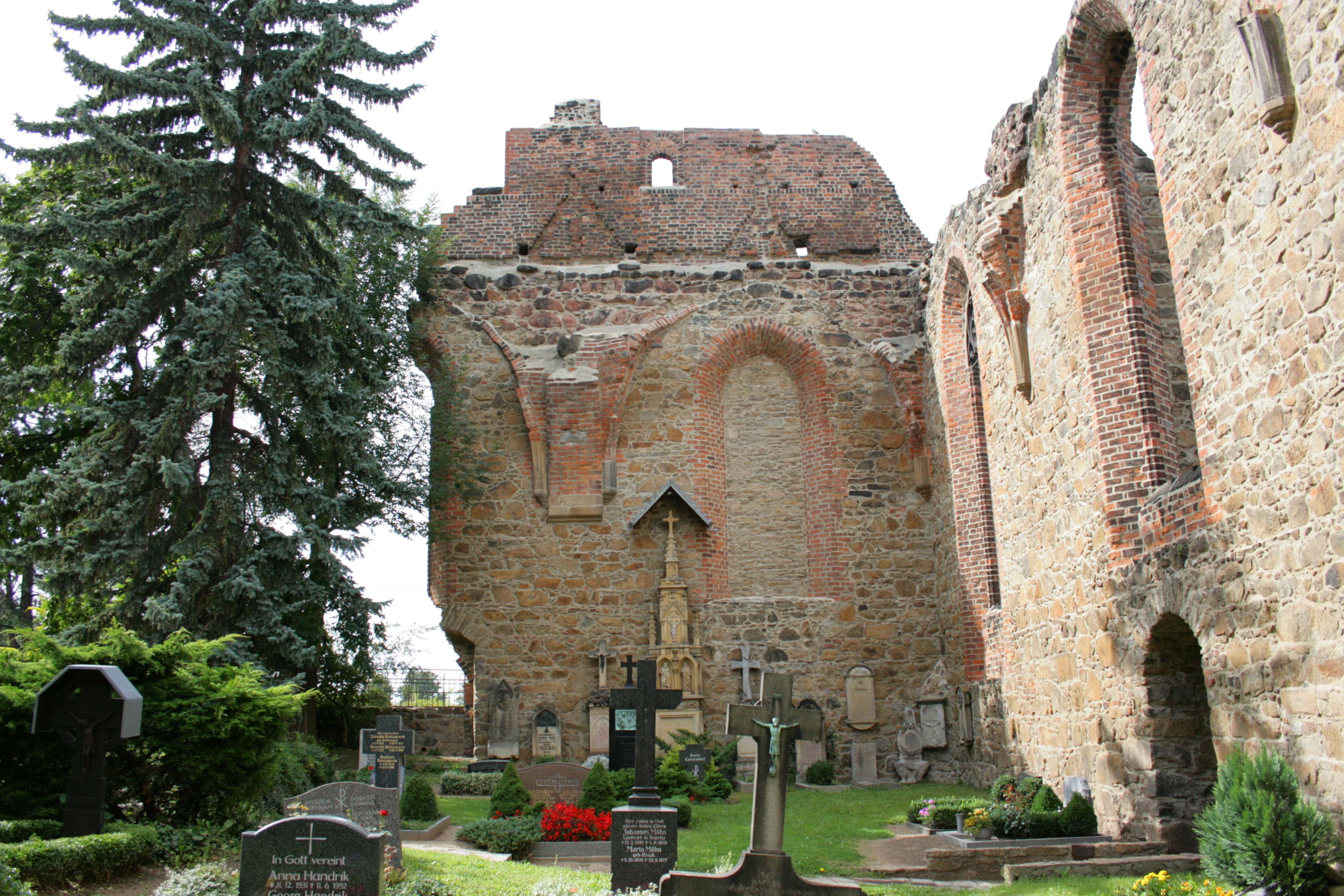 Nikolaikirche und -friedhof in Bautzen Hornjoserbsce: Na Mikławšku w Budyšinje.